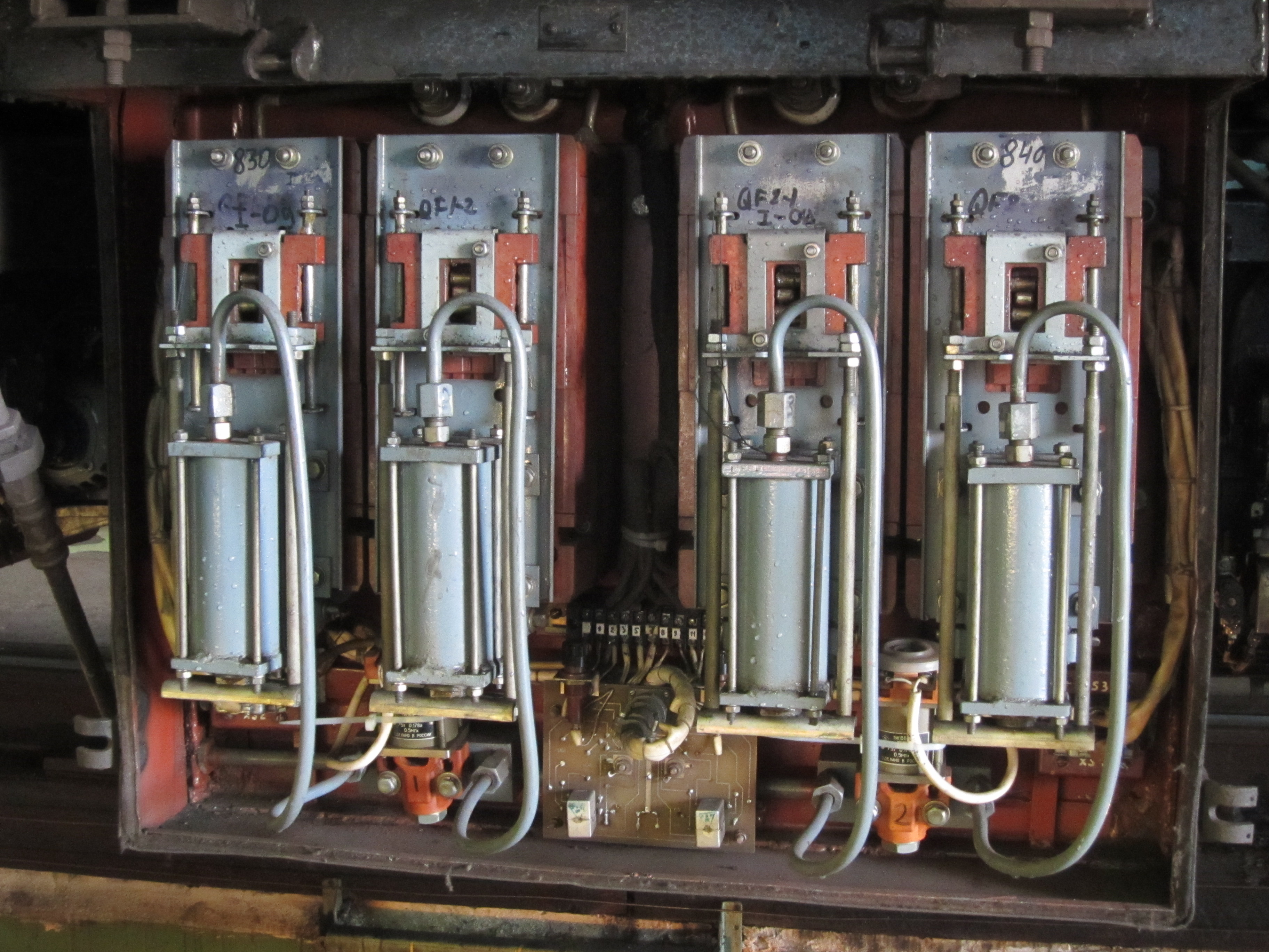 Комплексное устройство защиты ЯВ-1001. Применяется на вагонах метро модели 81-717 и 81-714